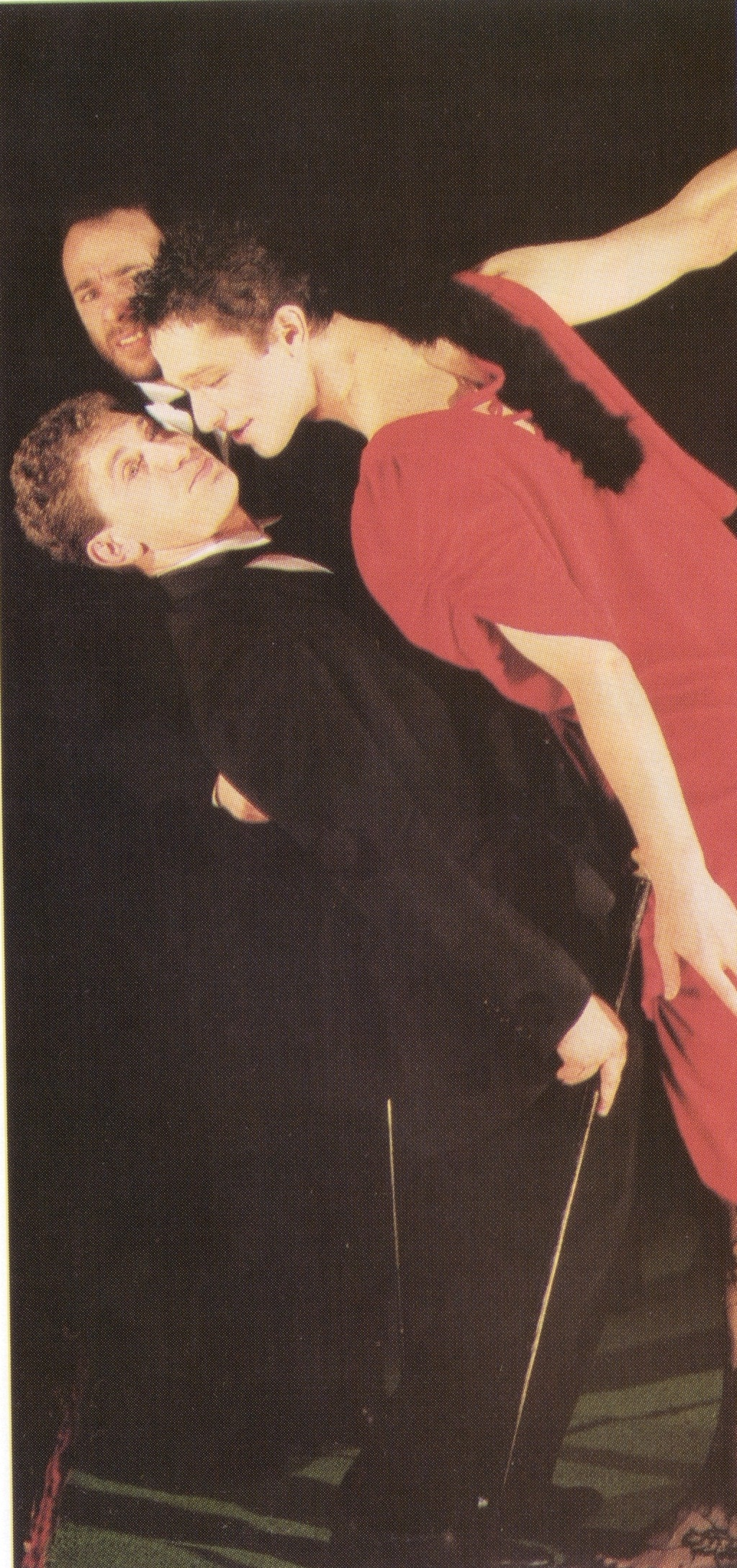 רוזנקרנץ וגילדנשטרן מתים בתיאטרון גשר